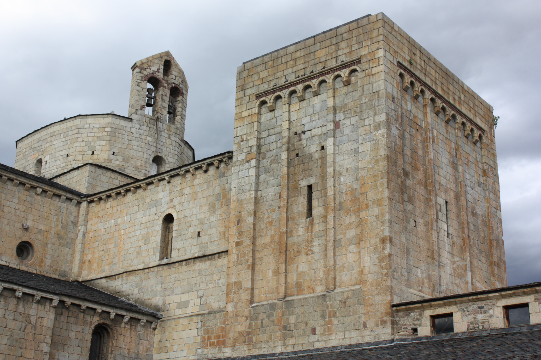 Catedral d'Urgell, destacada la torre de Sant Just.